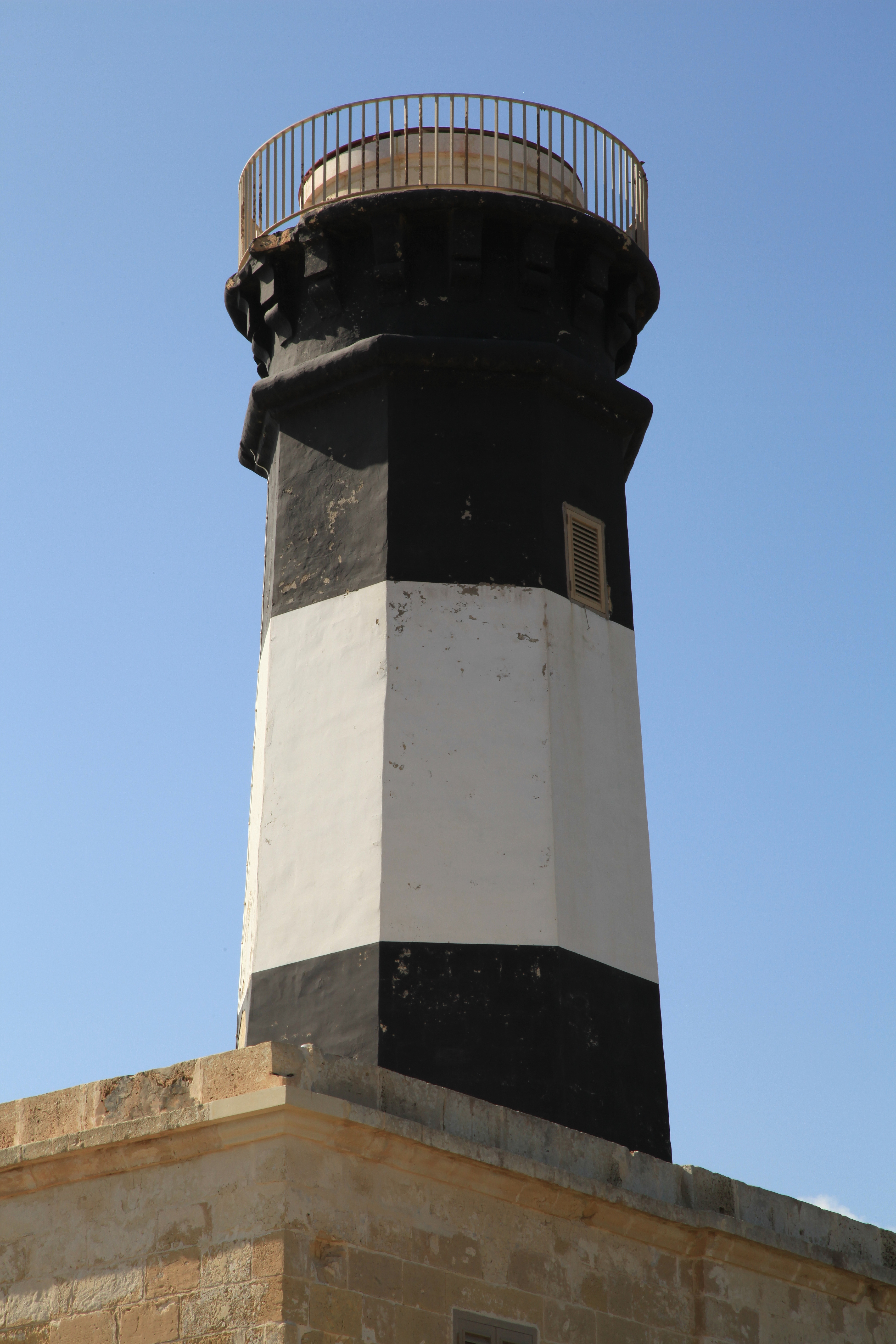 Delimara Lighthouse, Triq Delimara in Marsaxlokk, Malta